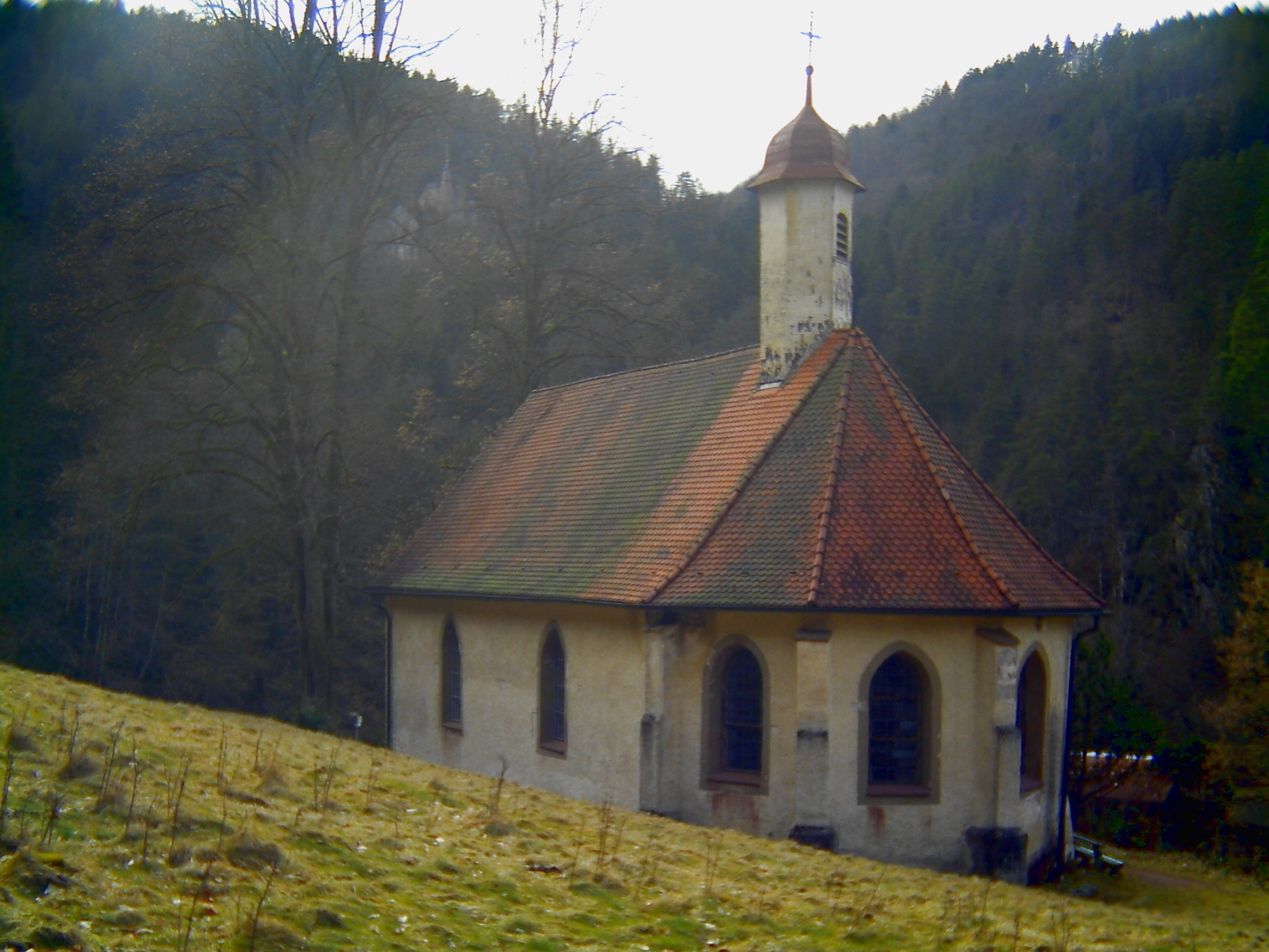 Falkensteiner Kapelle, Schramberg, dahinter Ruine Falkenstein (Obere Falkenstein)